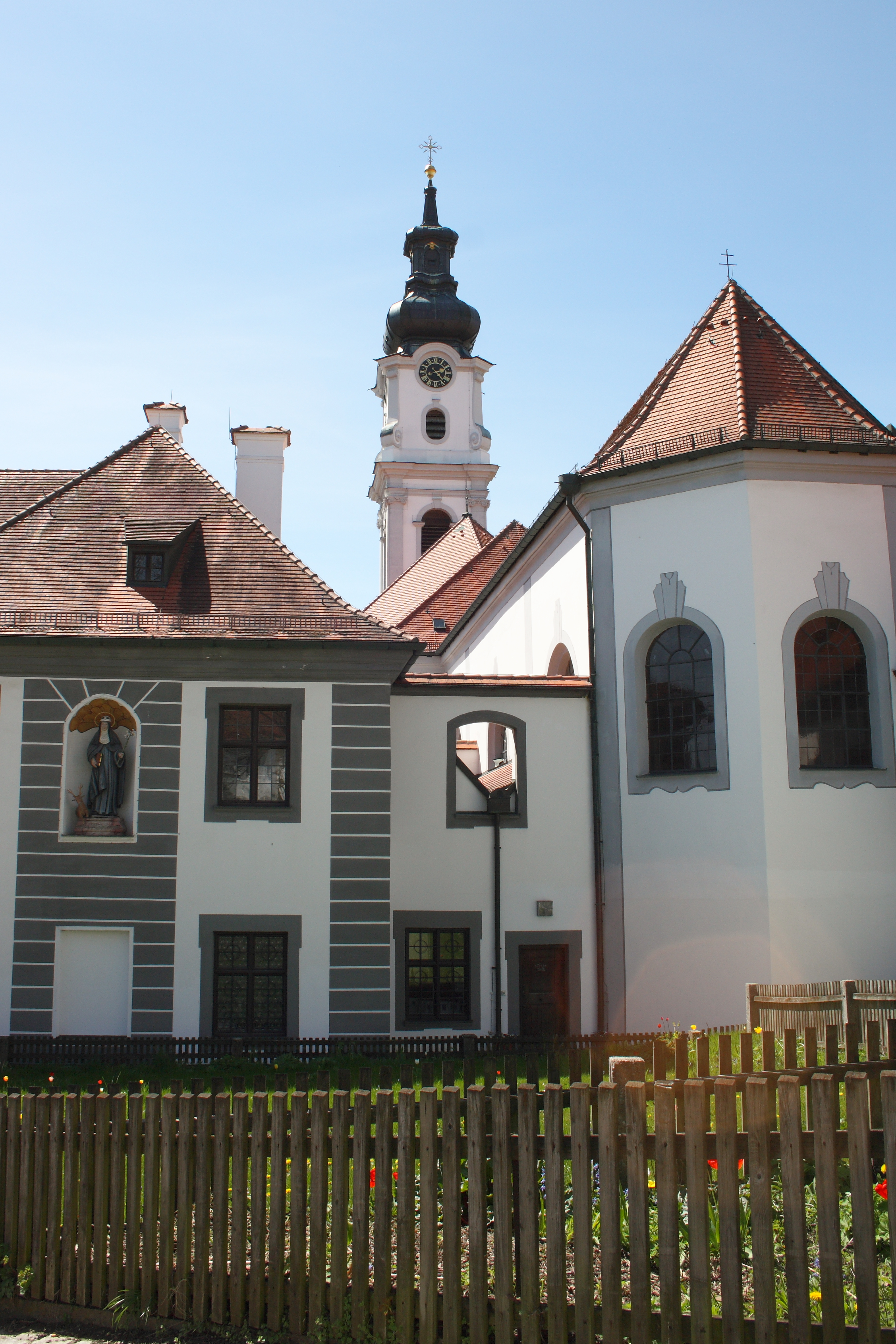 Katholische Pfarr- und Klosterkirche St. Alto und St. Brigitta in Altomünster im Landkreis Dachau (Bayern), Klostergebäude und Kirche von Osten